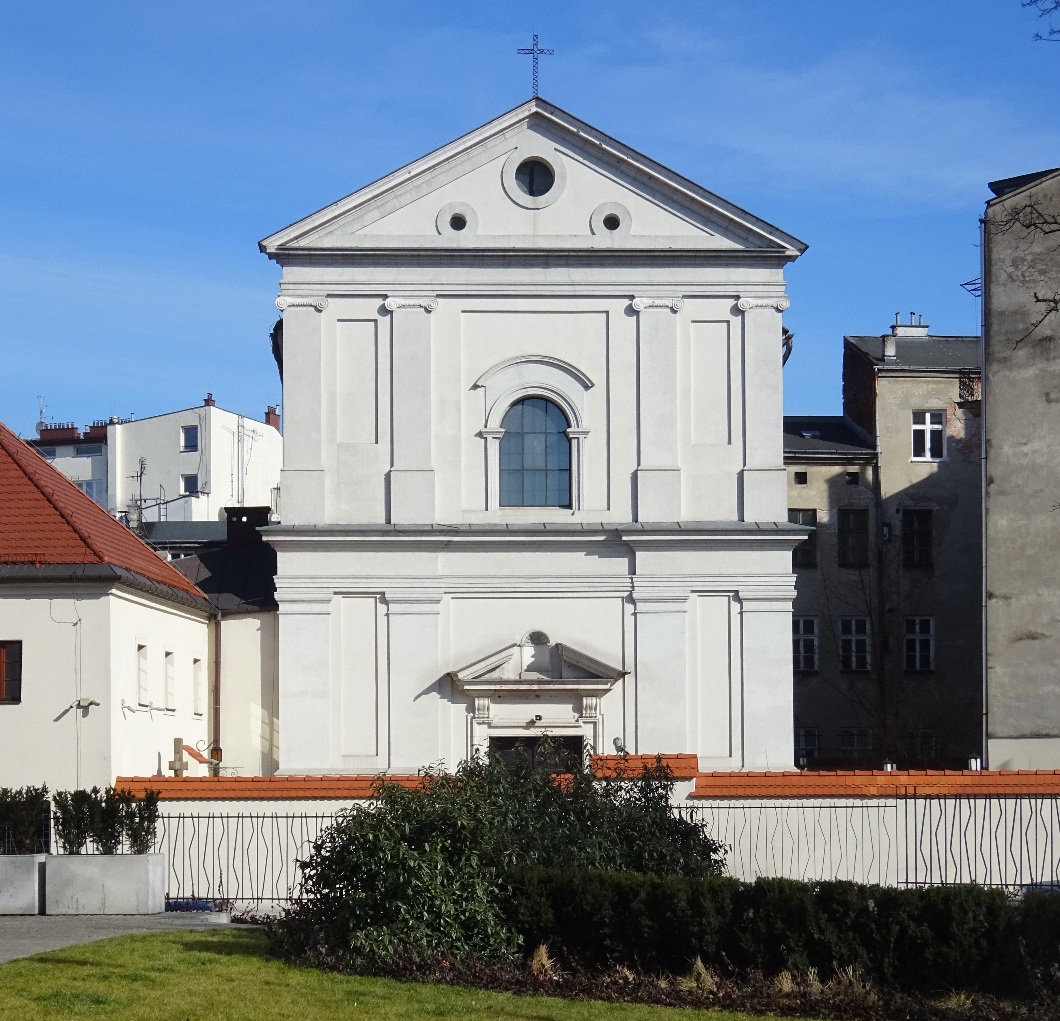 Kościół św. Agnieszki w Krakowie. Widok fasady z ulicy Józefa Dietla. 2018